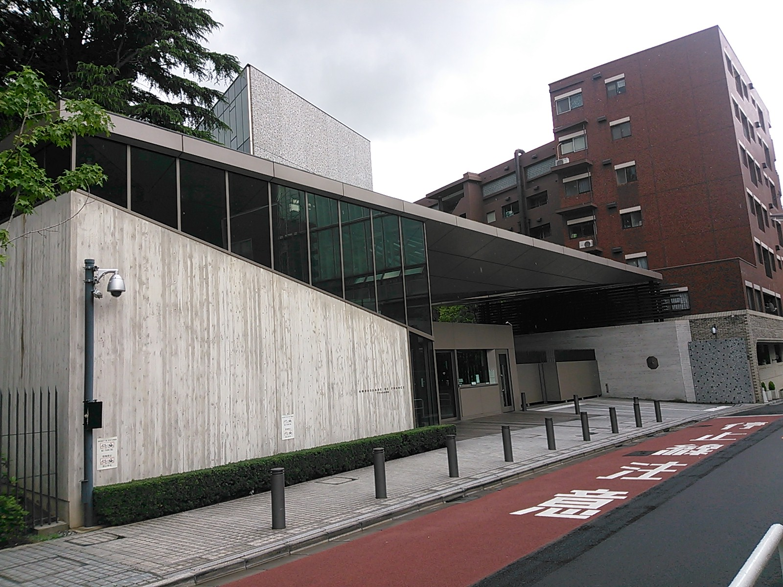 東京都港区南麻布、駐日フランス大使館